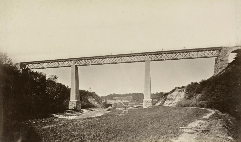 Bahnstrecke Winterthur-Koblenz bei Zweidlen: Glattbrücke bei Rheinsfelden